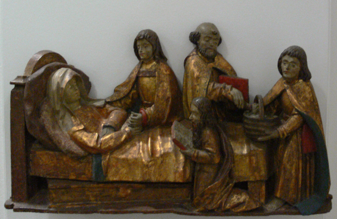 Tod Mariens (Predella?), Anfang 16. Jahrhundert, aus Kloster Mehrererau bei Bregenz Vorarlberger Landesmuseum, Bregenz